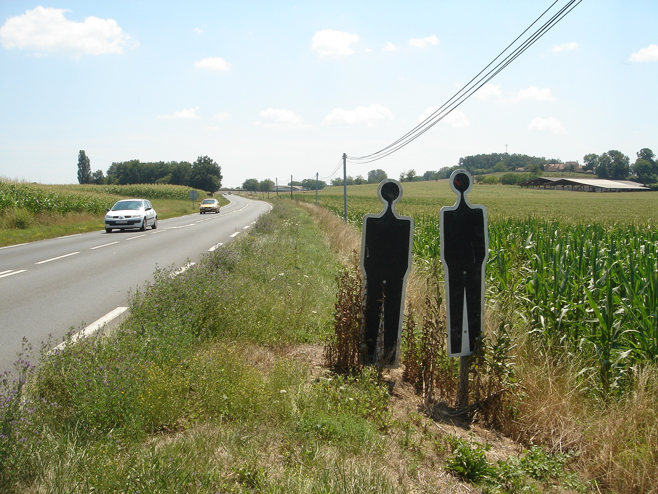 Hinweis auf Verkehrstote an der N 21 zwischen Périgueux und Limoges. Die Figuren stehen für je einen Toten und dienen der Abschreckung und Mahnung zur Umsicht.